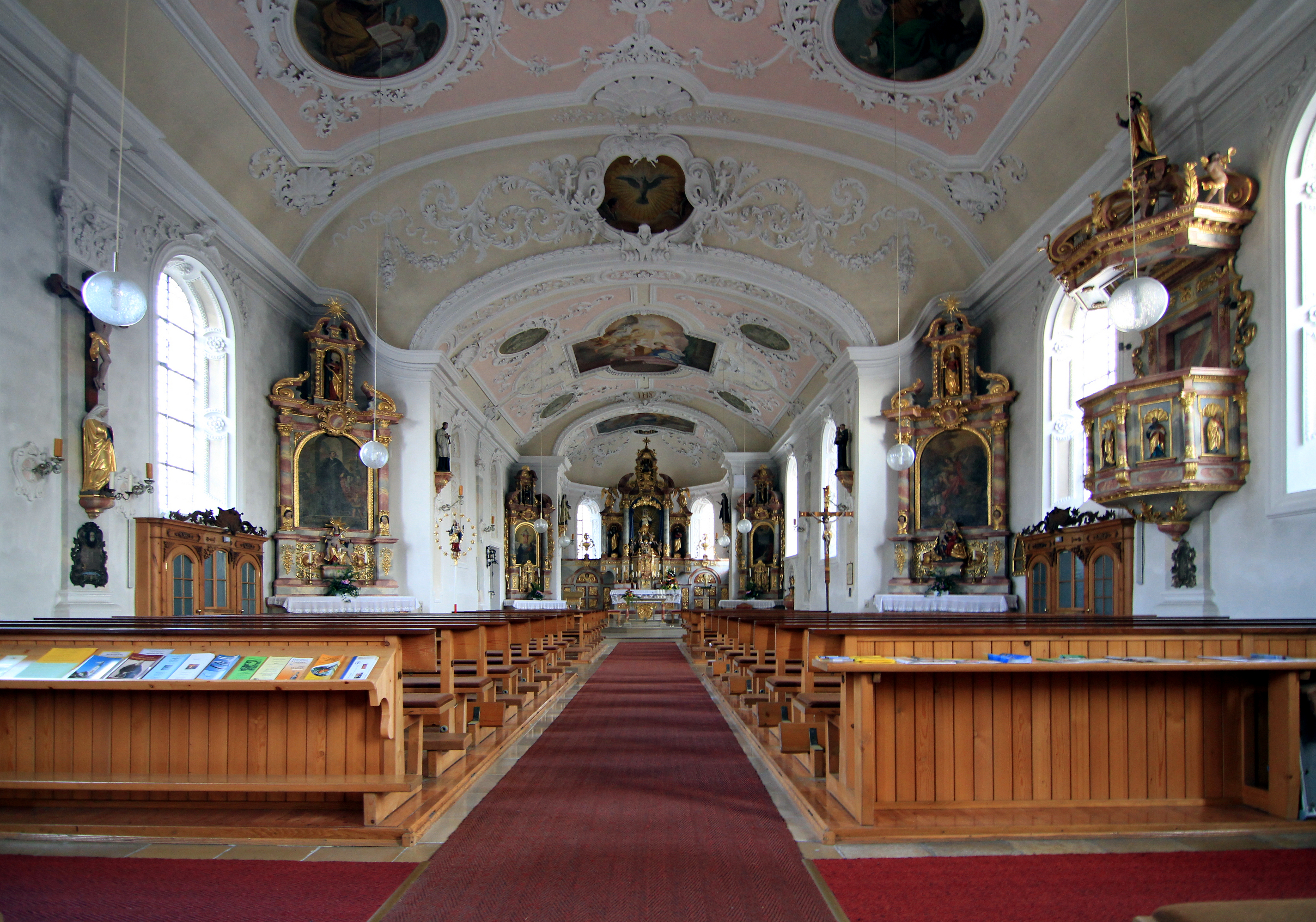 Heilig-Geist_(Durach)This is a photograph of an architectural monument.